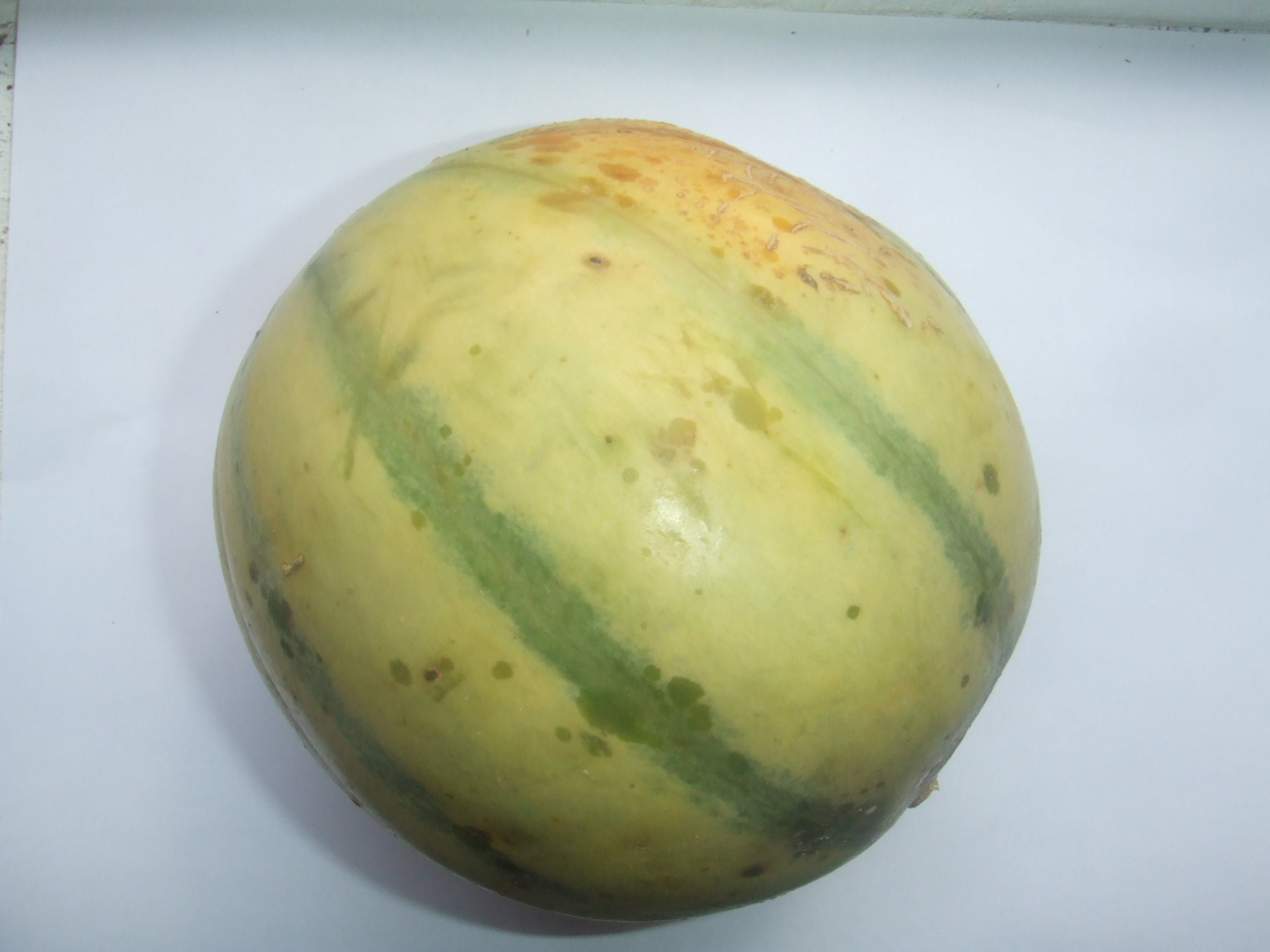 Charentais, gekocht op de Binnenrotte-markt in Rotterdam